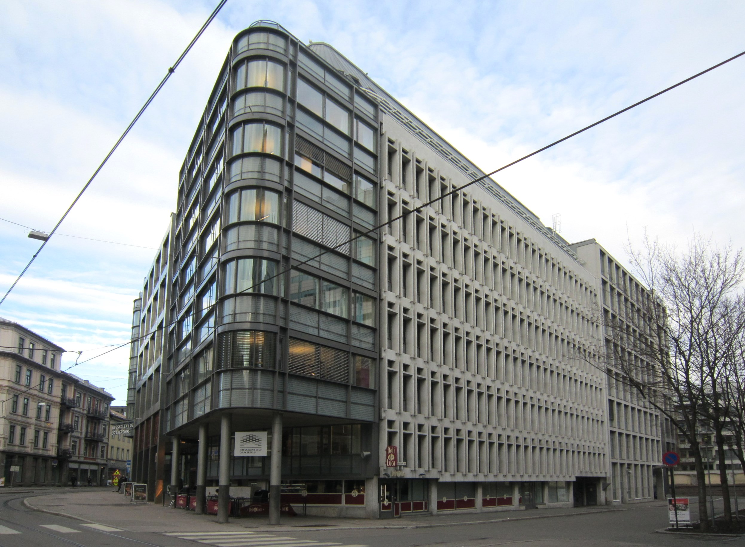 Edvard Storms gate 5, Oslo